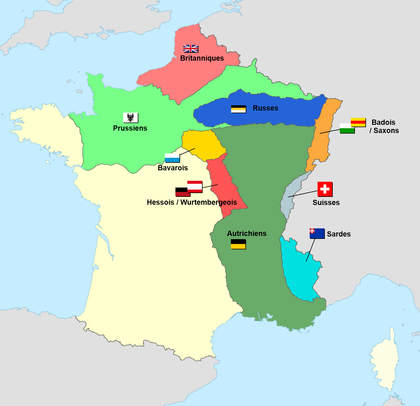 Carte de la France sous occupation des Alliés de 1815 à 1818.